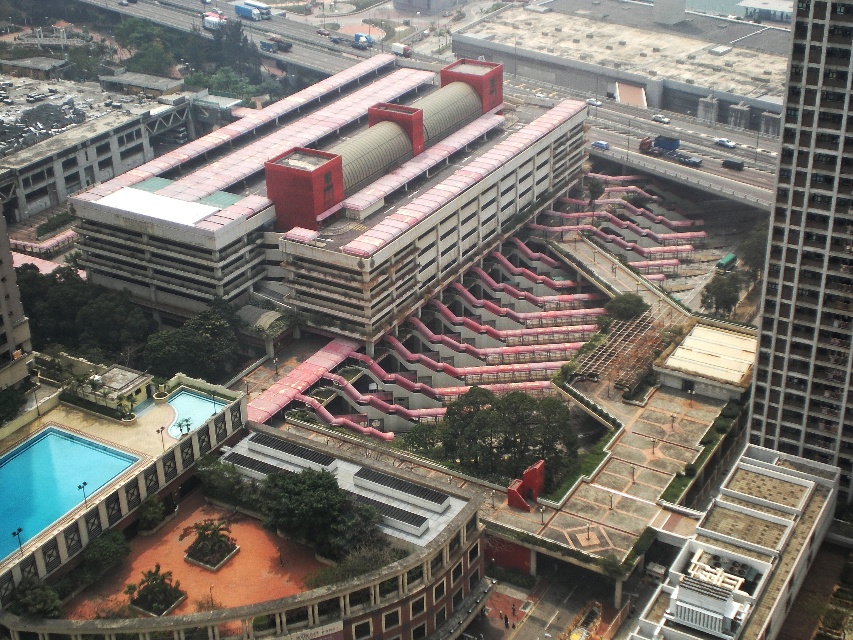 中文（香港）: 荃灣運輸大樓全景